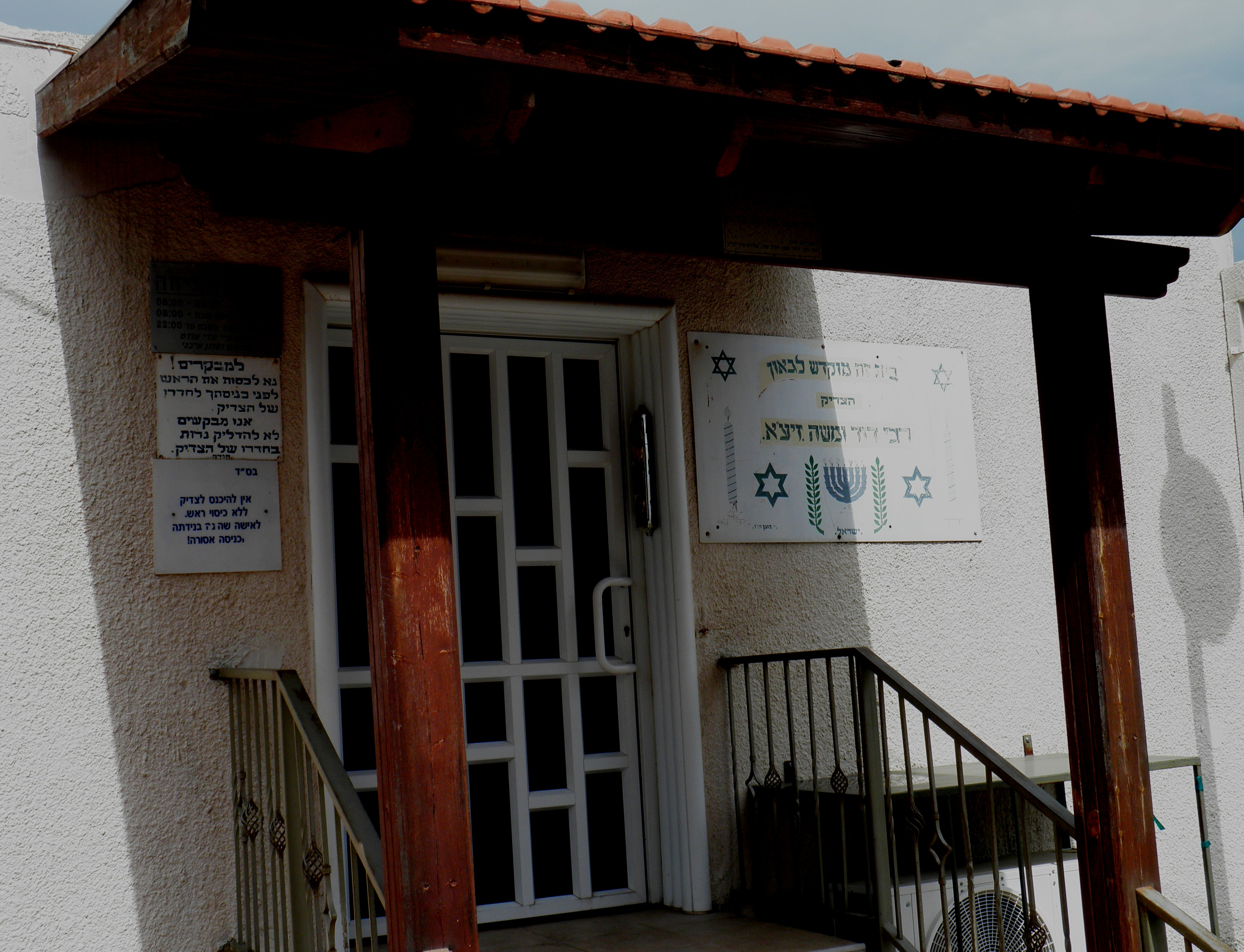 ציון רבי דוד ומשה בצפת